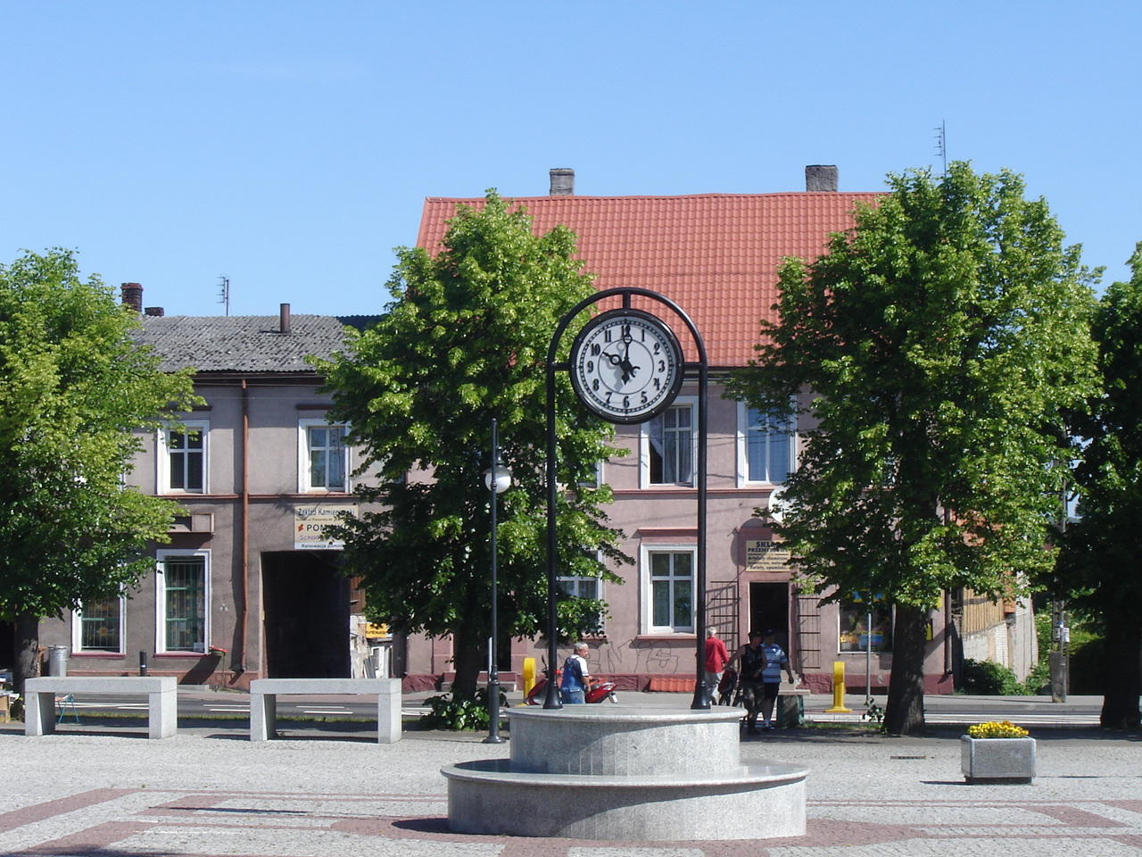 Rynek w Suchaniu, autorka: H.Ciszewska-Czyż.